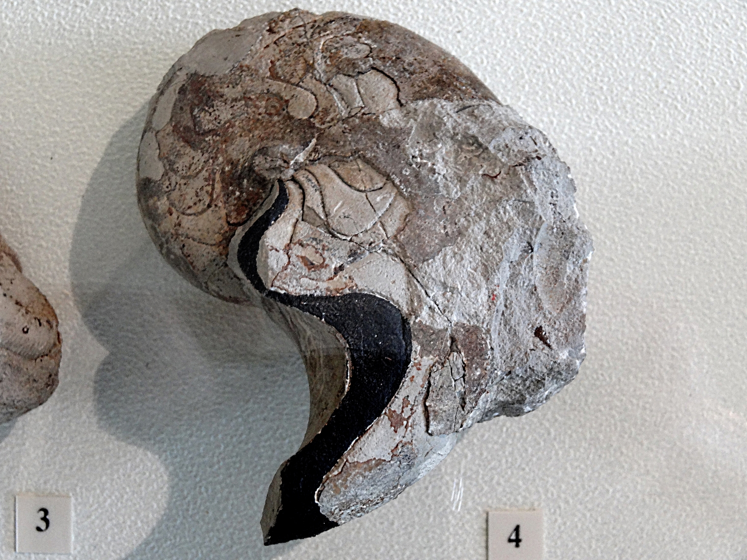 Nautilidae Perlboot aus dem Schwarzen Jura der Fränkischen Alb; Fundort nahe Bad Staffelstein /Oberfranken; Exponat in der Petrefaktensammlung Kloster Banz